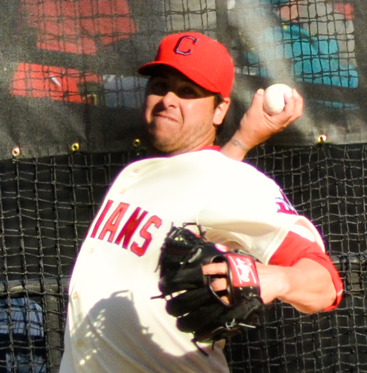 Anthony Swarzak